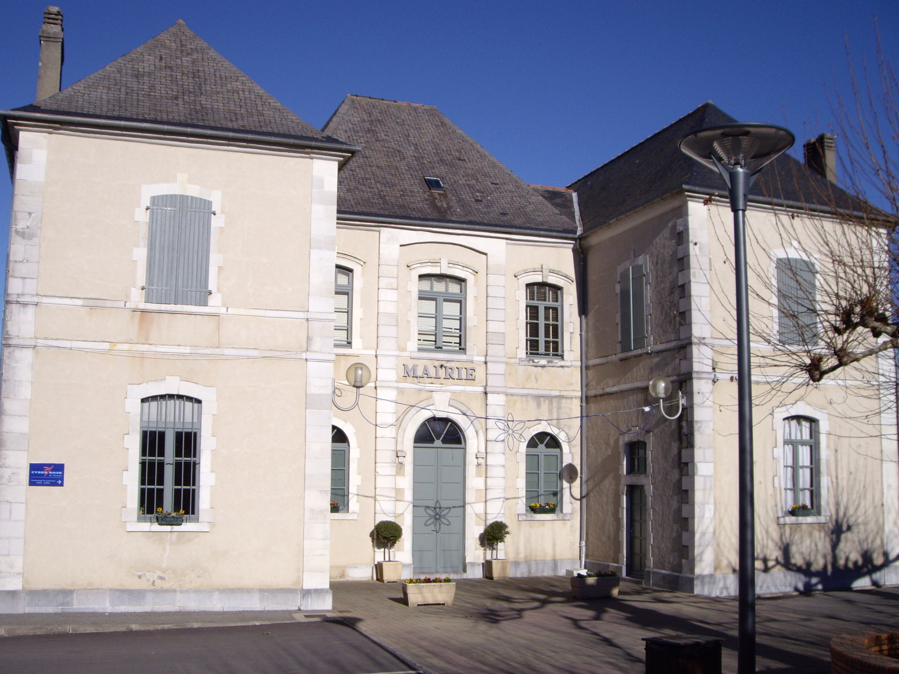 Mairie de Ger (64)